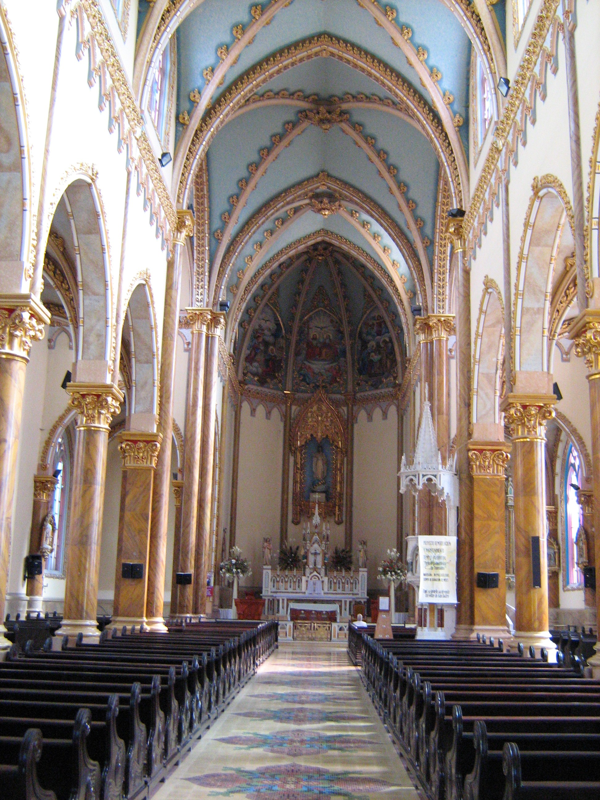 Iglesia de Nuestra Señora del Rosario del municipio de Donmatías, Antioquia, Colombia